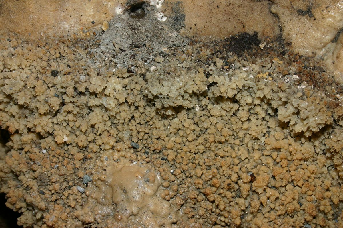 Binghöhle bei Streitberg